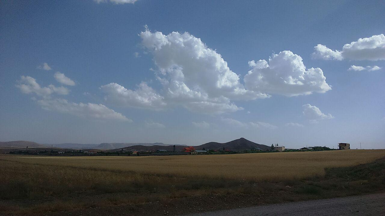 نمایی از هومند روستای سید آباد